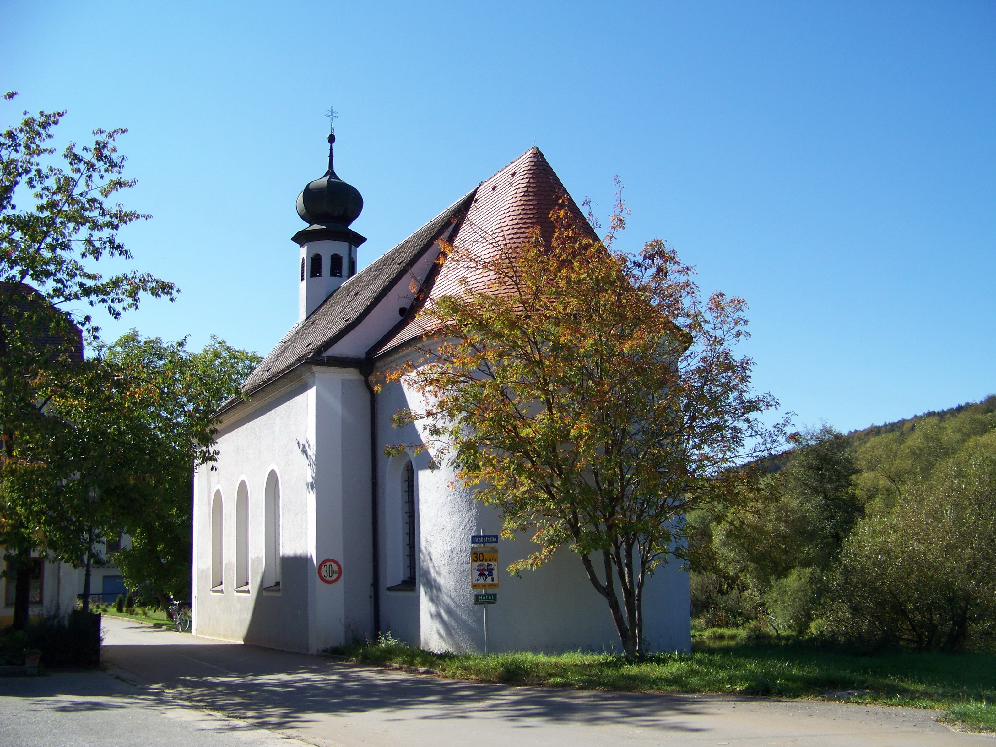 Duggendorf, Heitzenhofen. Katholische Filialkirche und Schlosskapelle St. Wolfgang, traufständiger Saalbau mit eingezogenem Chor und Dachreiter mit Zwiebelhaube, um 1715; mit Ausstattung.